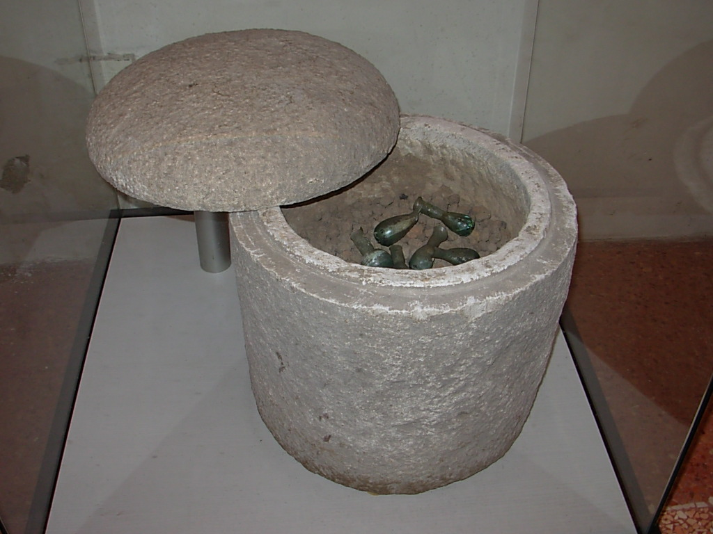 tomba cilindrica in pietra da Vo Pindemonte (Isola della Scala)